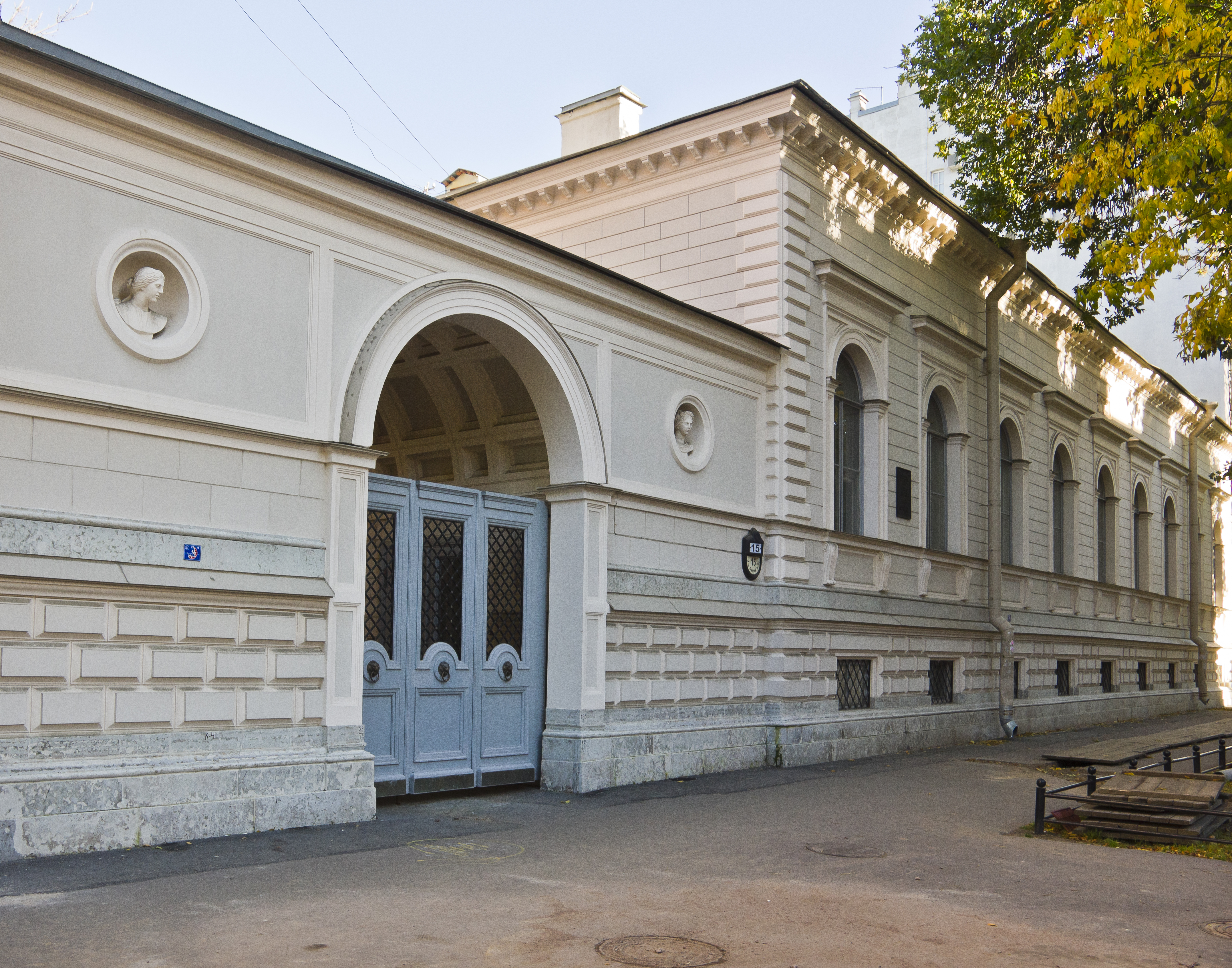 4-я линия В.О., д.15